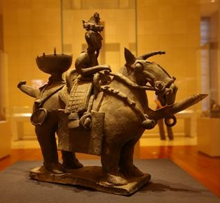 도제기마인물상 (陶製騎馬人物像) 국보 91 호 (지정일 : 1962-12-20) 신라(5~6세기) 때의 말을 탄 1쌍의 토우(土偶) 국립중앙박물관 소장